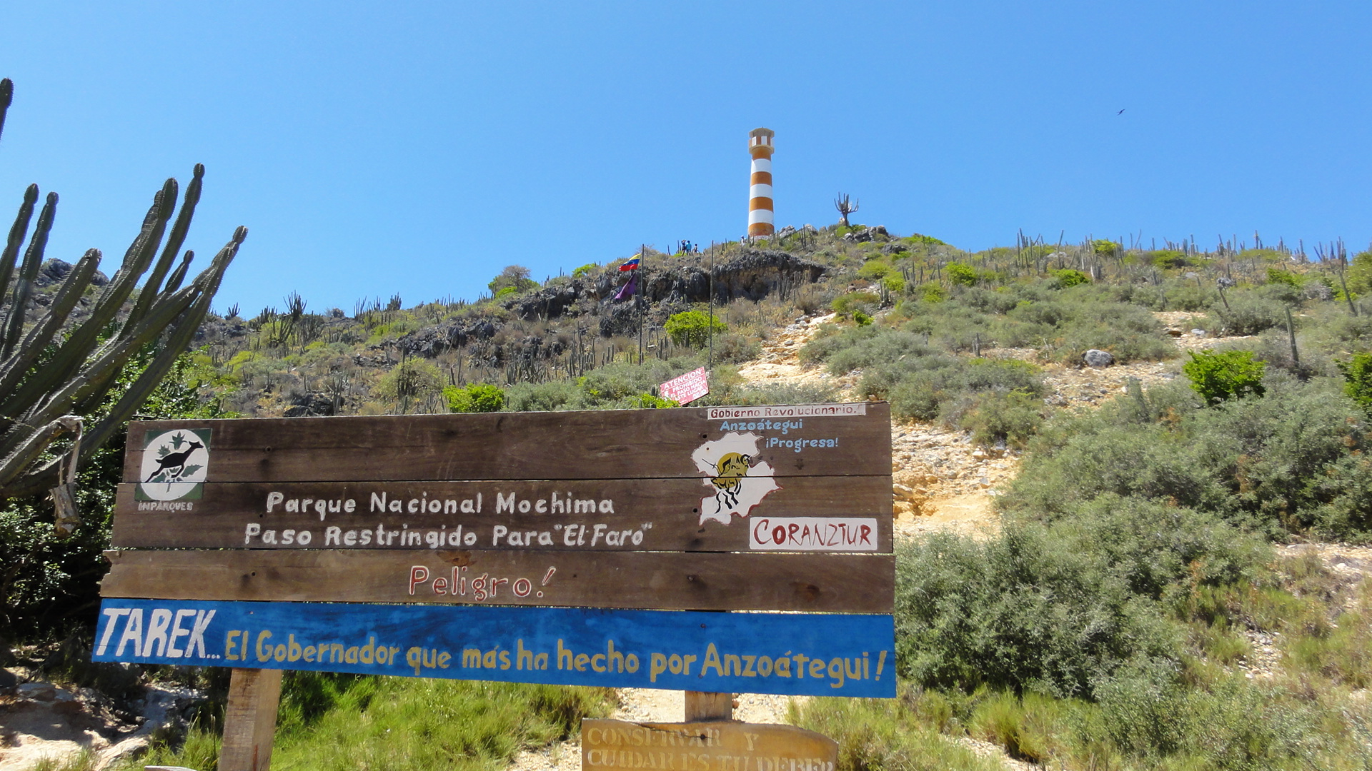 Playa El Faro Mochima Puerto La Cruz